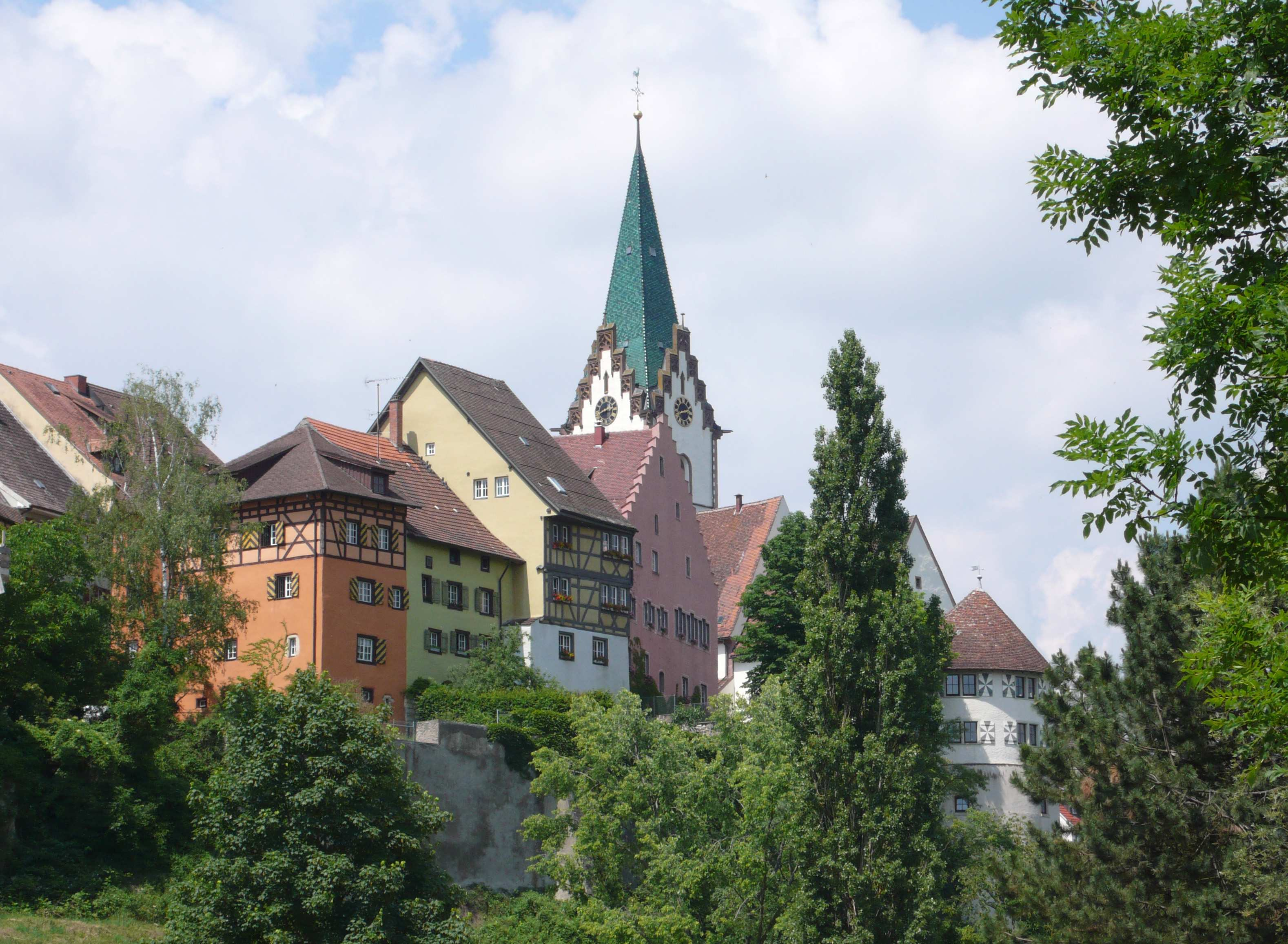 Engen, Germany, Altstadt